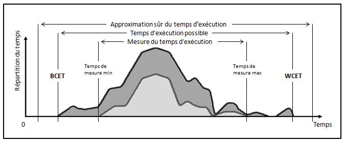 Une tache peut avoir une certaine variation de temps d’exécution en fonction des données d'entrée ou en fonction des différences d'environnements. L'ensemble de tous les temps d'exécution est représenté par la courbe supérieure. Le plus court temps d'exécution est appelé "Best Case Execution Time" (BCET), le pire temps d’exécution du programme est appelé "Worst Case Execution Time" (WCET).